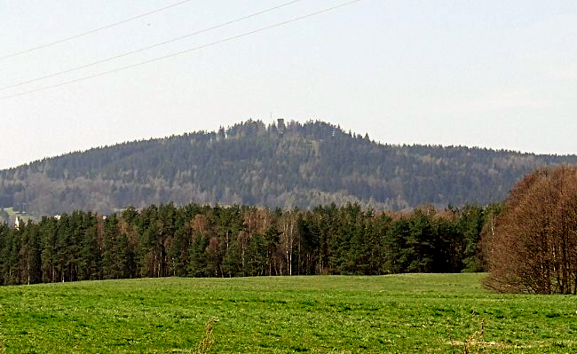 Kapellenberg von Skalná aus fotografiert